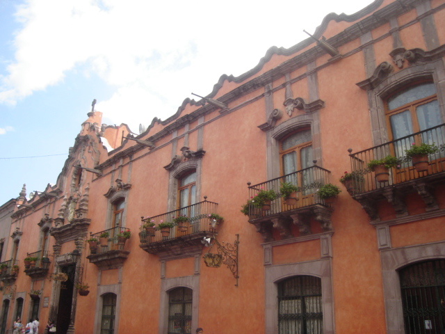 Casa de la Marquesa — in the Centro Histórico of Santiago de Querétaro, Municipality of Querétaro, Querétaro state, México.